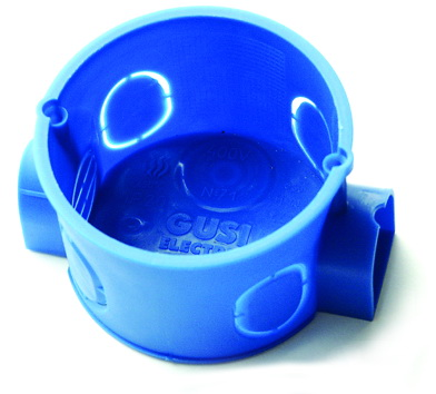 DCF 1.0